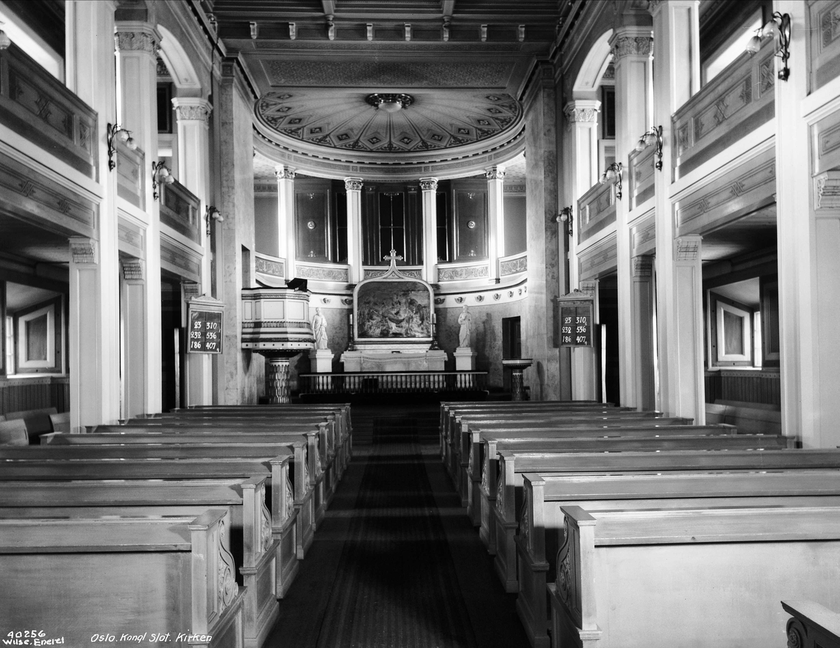 Slottskapellet er et kapell i Det Kongelige Slott i Oslo